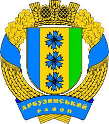 Герб Арбузинського району